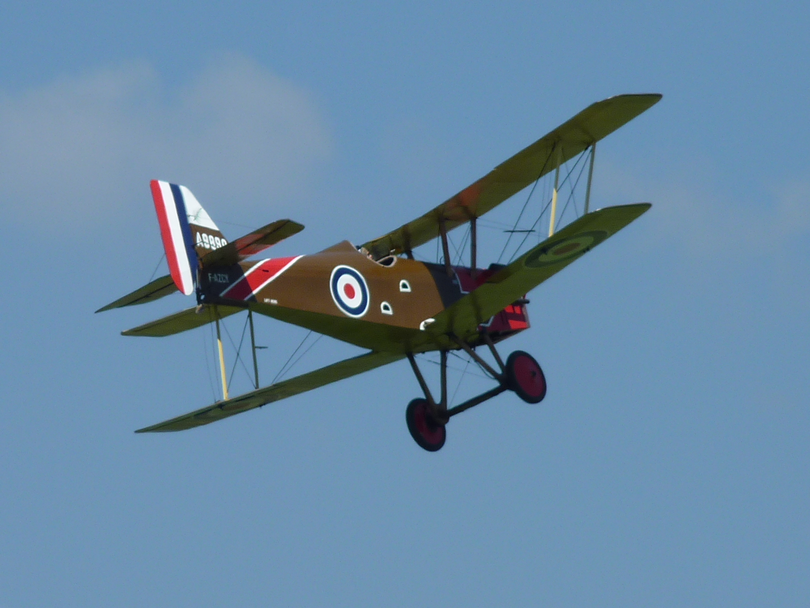 Royal Aircraft Factory S.E.5 de l'Amicale Jean-Baptiste Salis. Il s'agit d'une réplique réalisée à partir d'une cellule de Stampe SV-4.